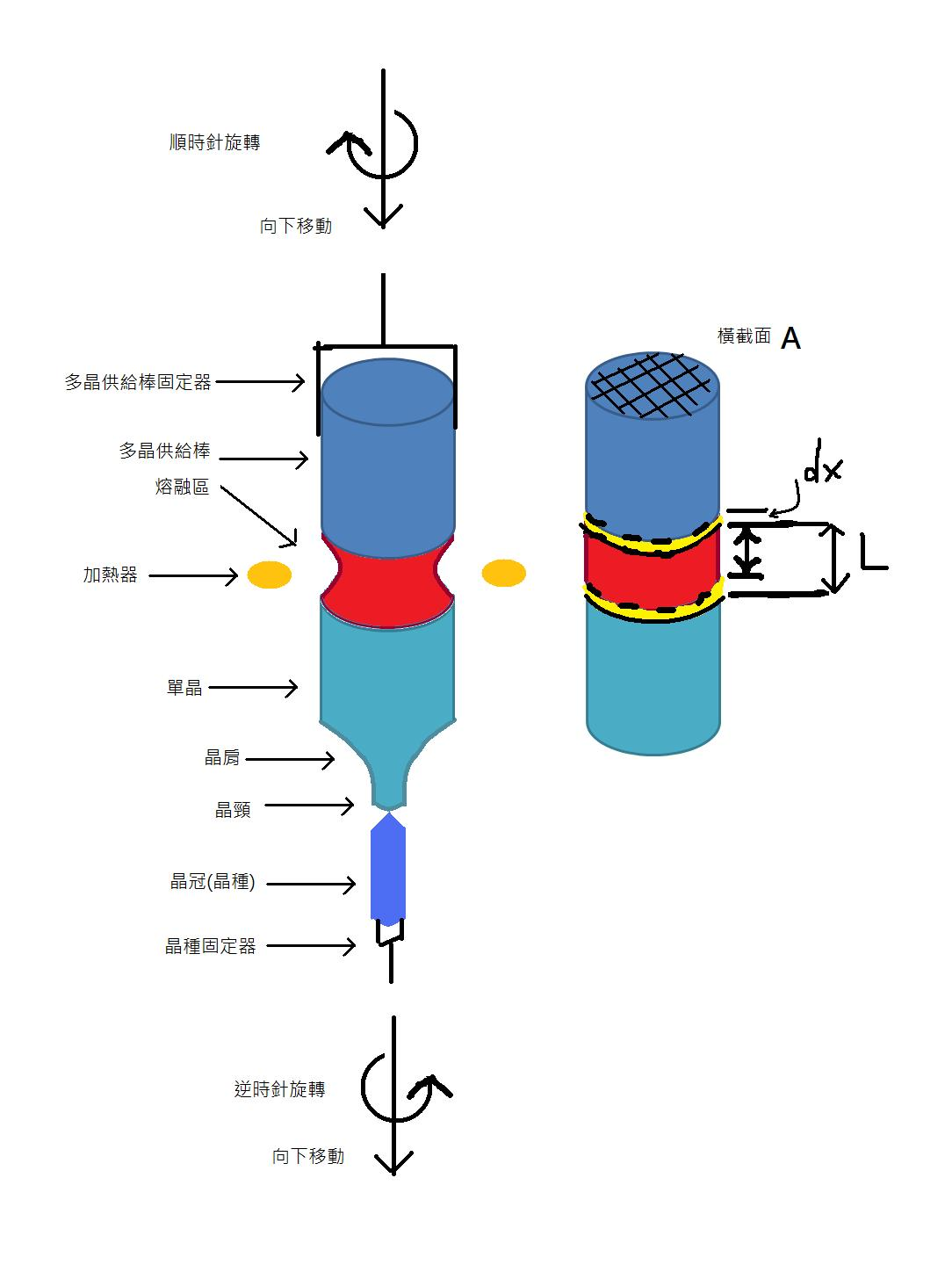 簡化之垂直區域熔煉示意圖